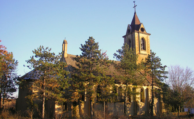 Немската църква в Бърдарски геран